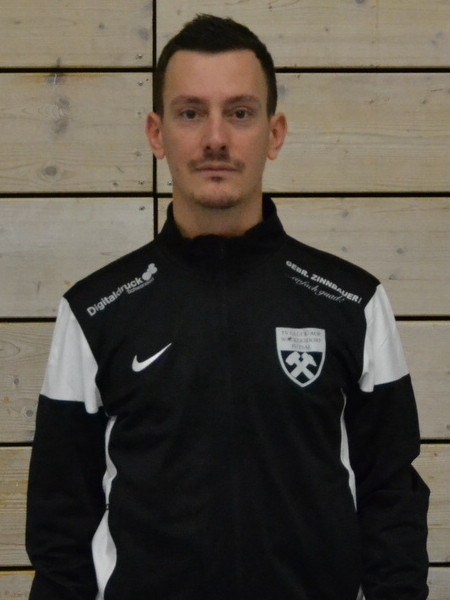 Markus Giesecke in den Wackersdorfer Farben (2016)